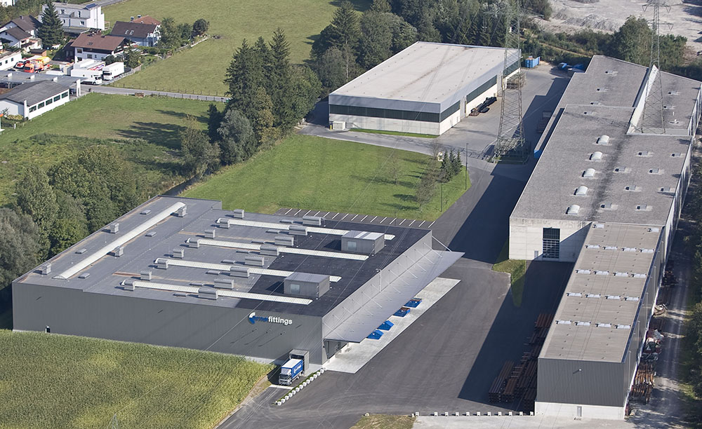 Erne Fittings Schlins Österreich2